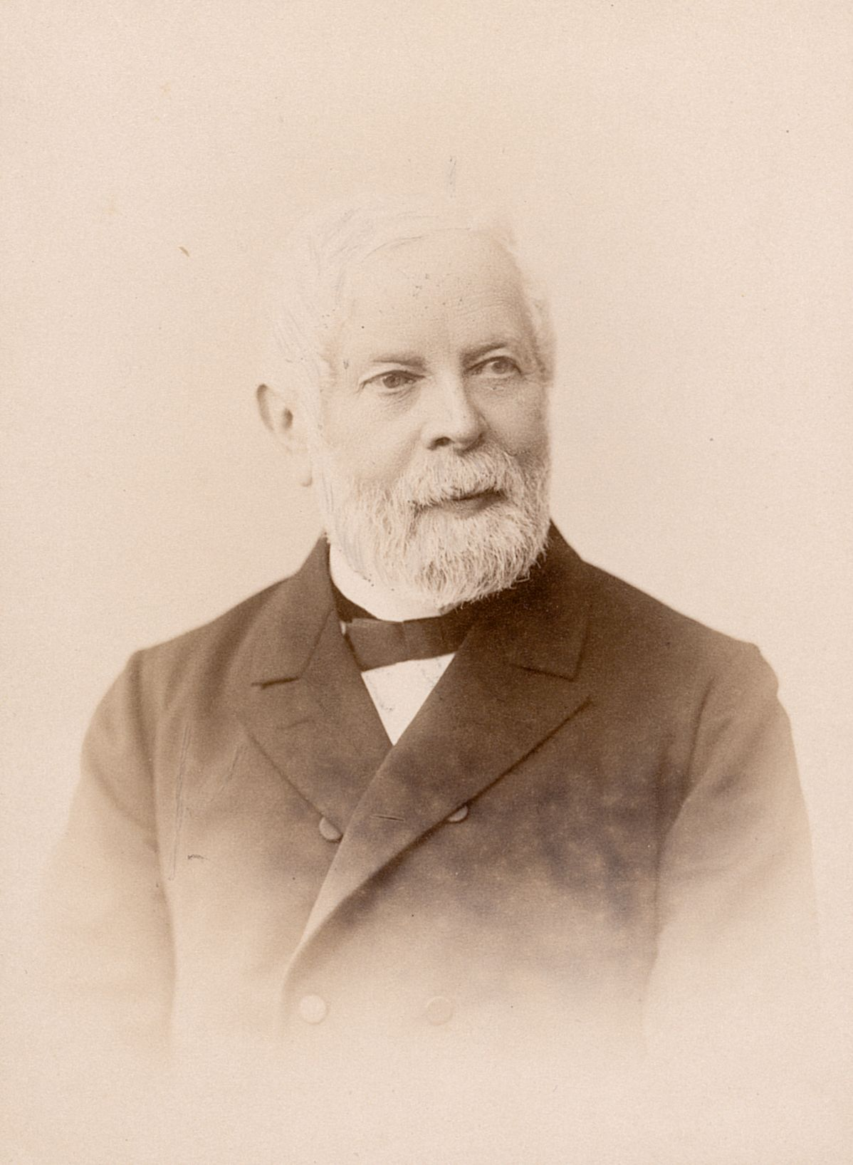 Foto von Wilhelm Heyd